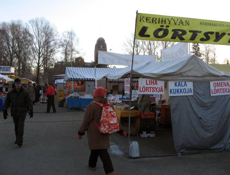 Joensuu (Finland) market place